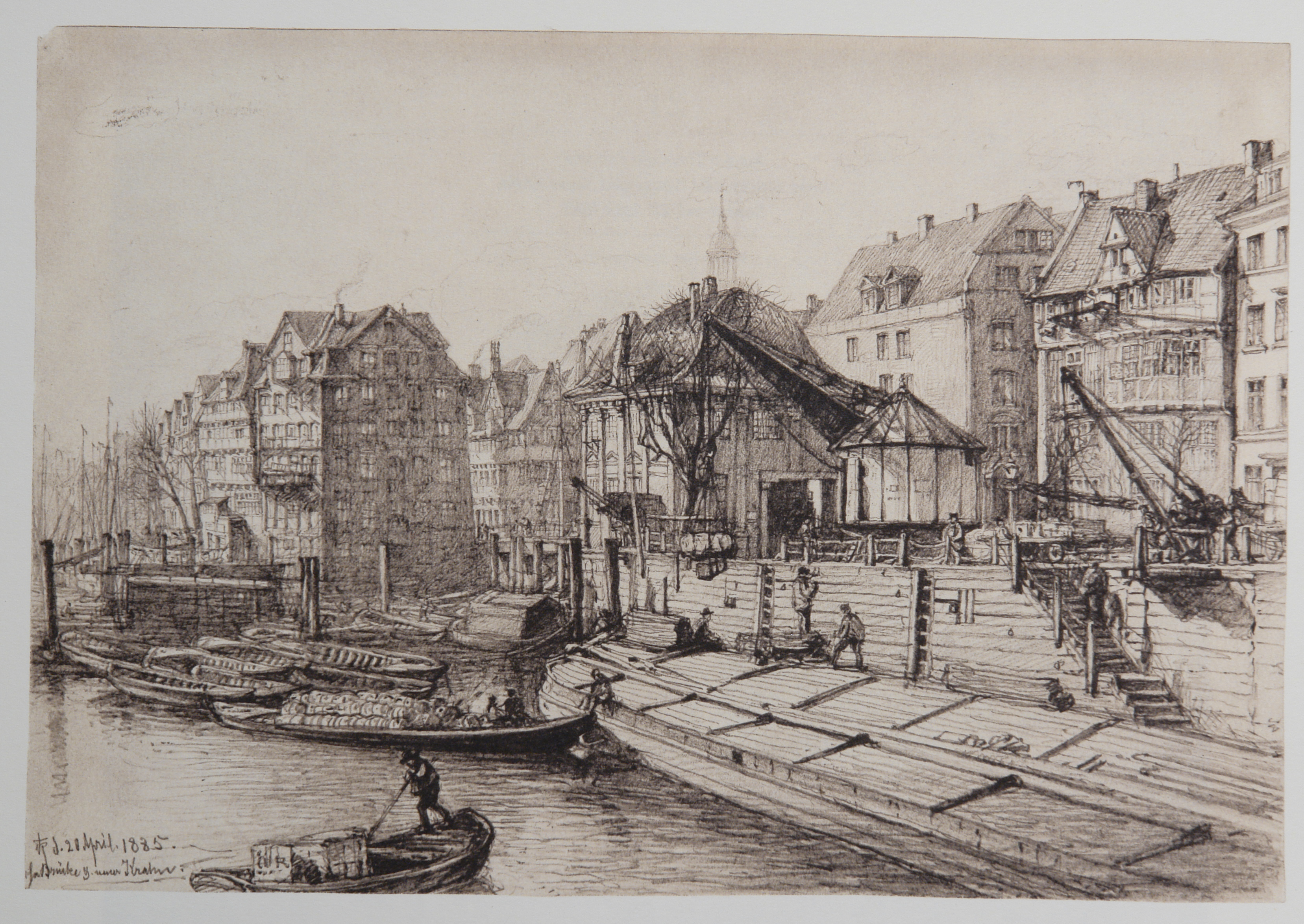 HAMBURG. Augenblicke einer Stadt 1882-1894. In 50 Zeichnungen von Johann Theobald Riefesell nach Originalen im Museum für Hamburgische Geschichte.